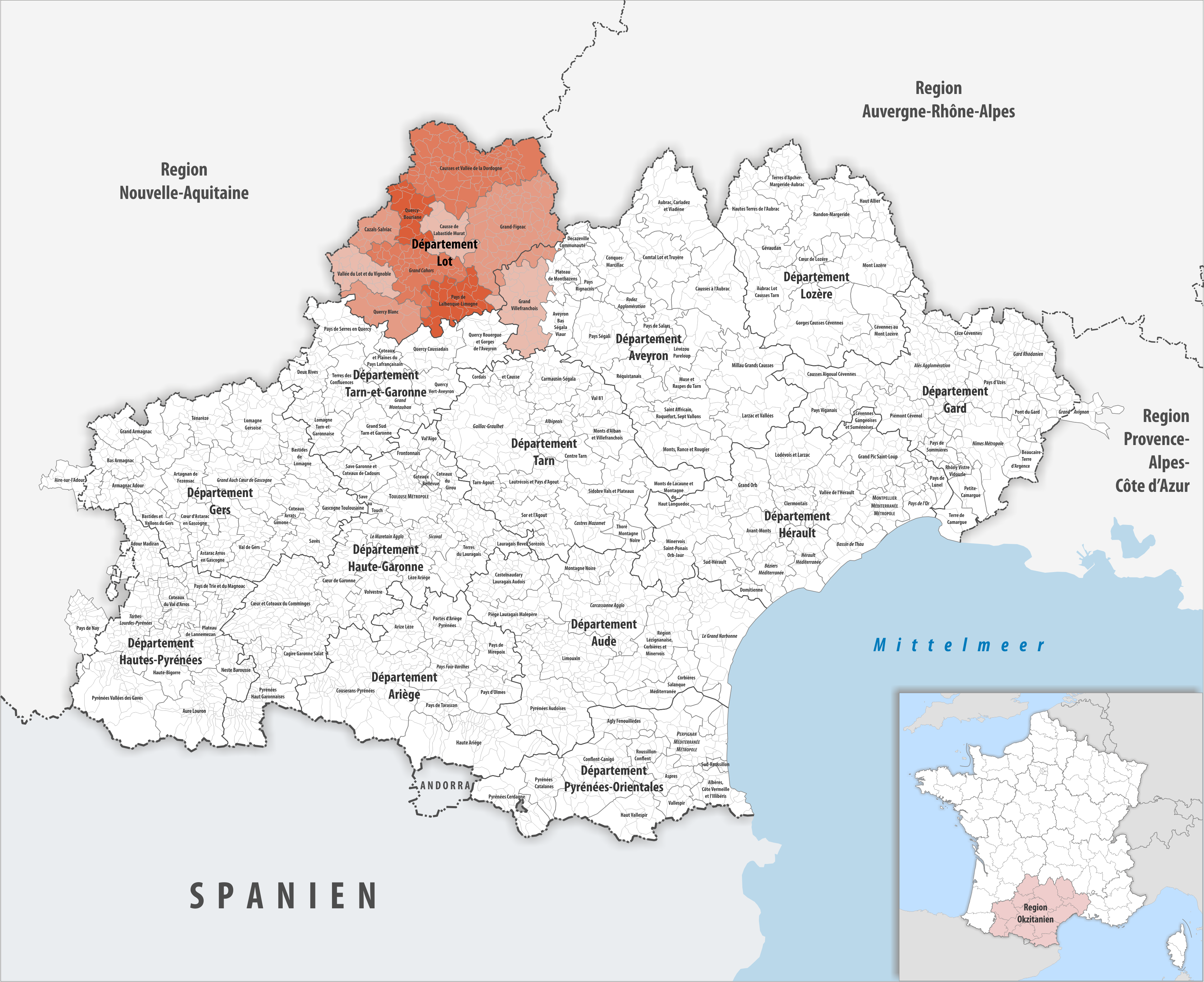 Gemeindeverbände im Département Lot